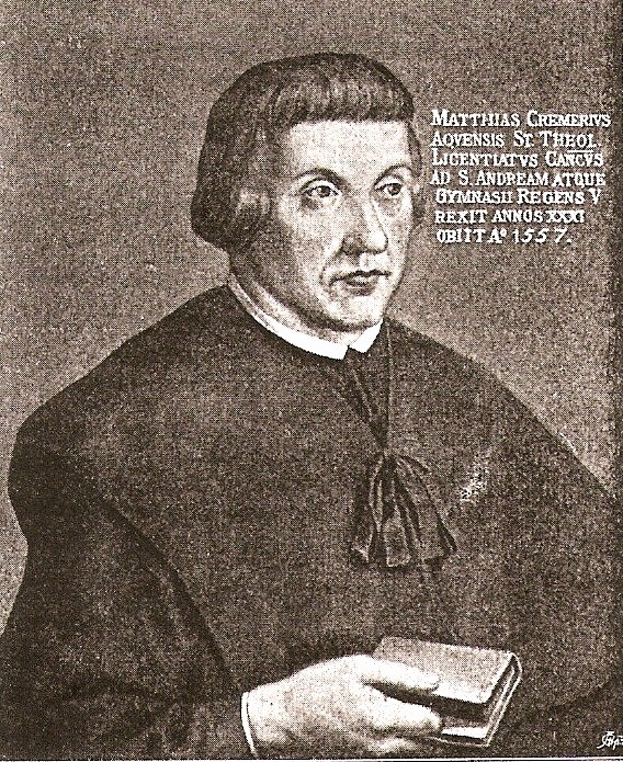 Scan einer Ablichtung des Gemäldes in der Kölner Studienstiftungsverwaltung